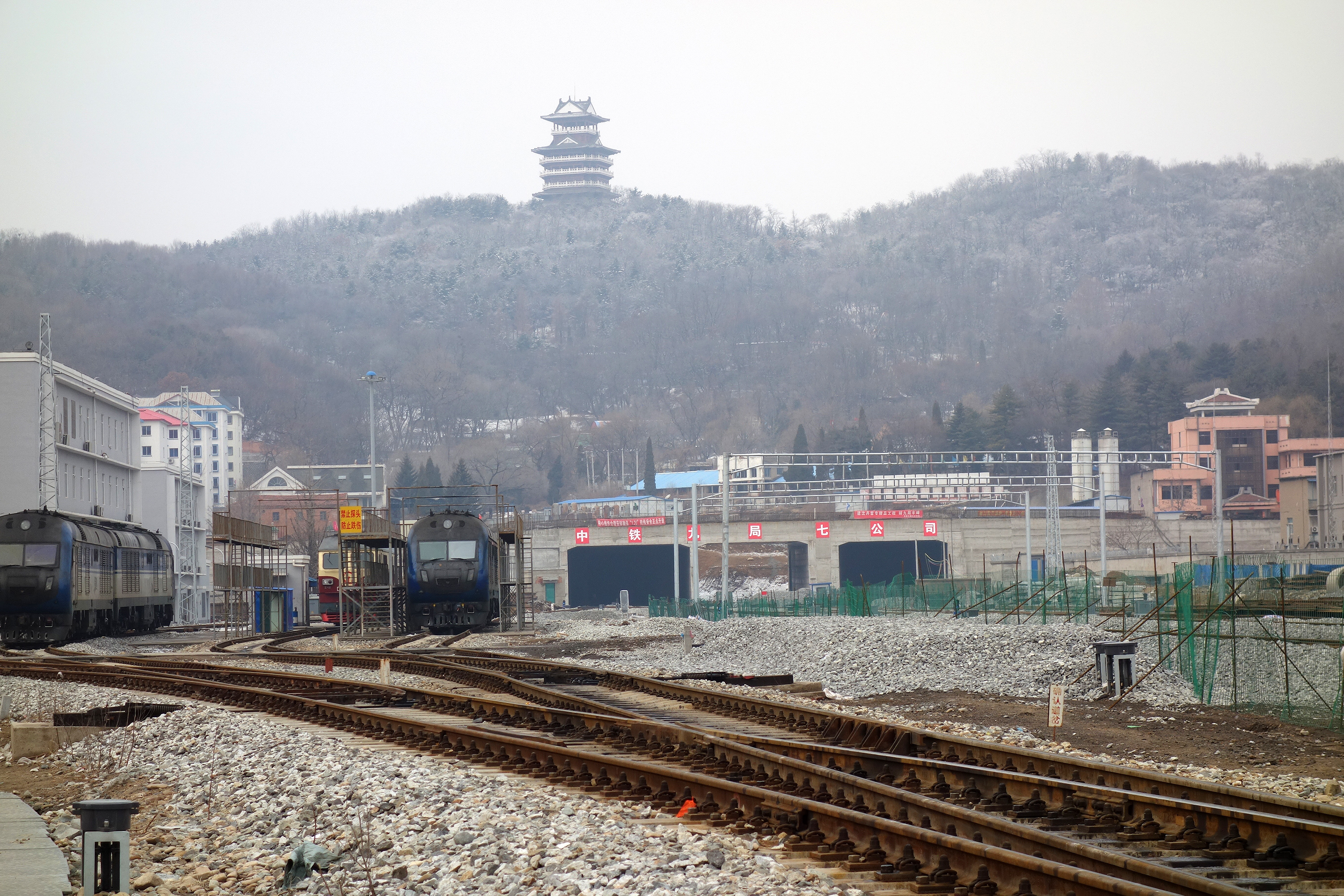 高铁隧道 rail tunnel under Jinjiangshan hill